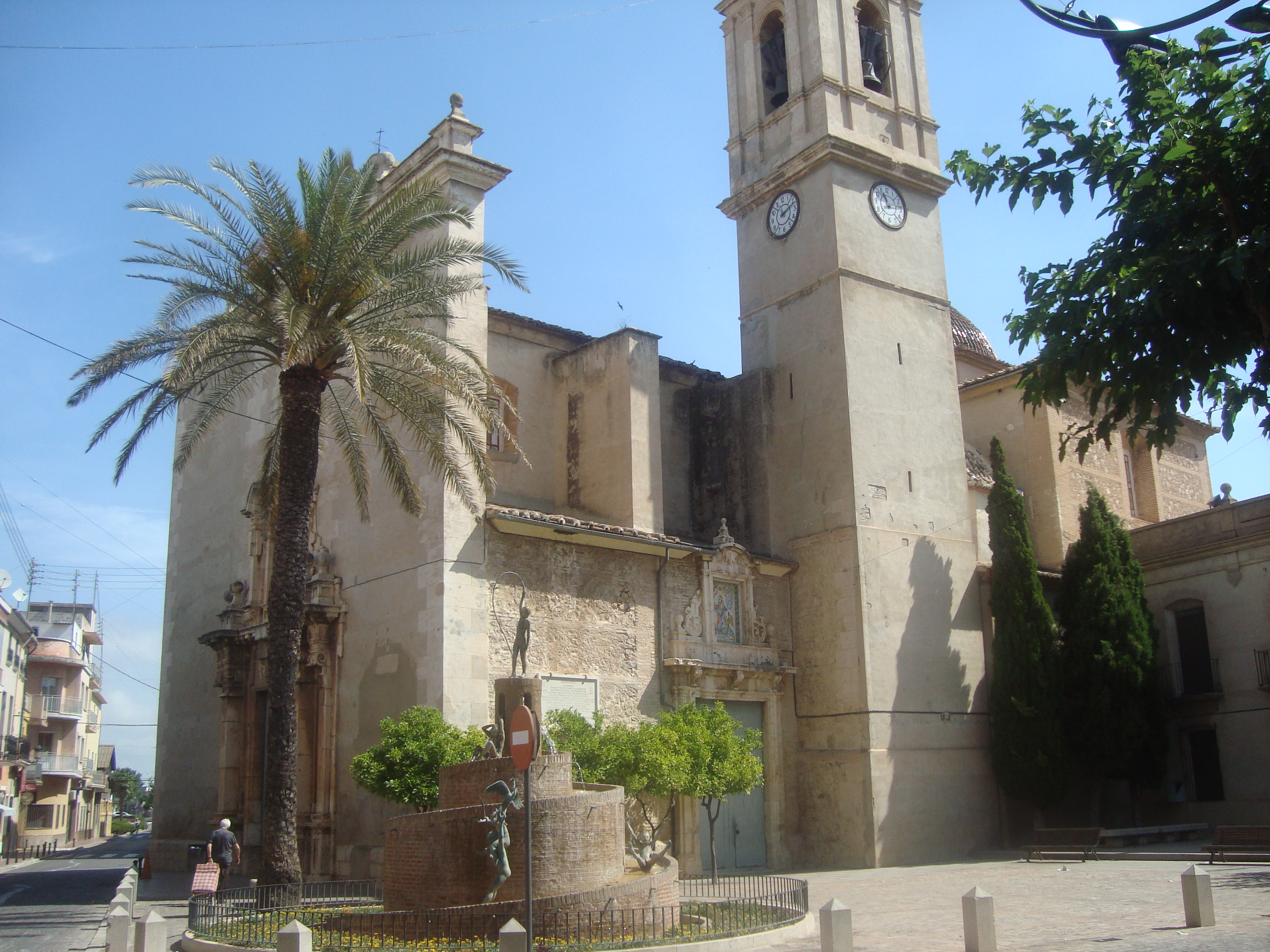 Església parroquial de Sant Pere (Albalat de la Ribera) 21.008-001.